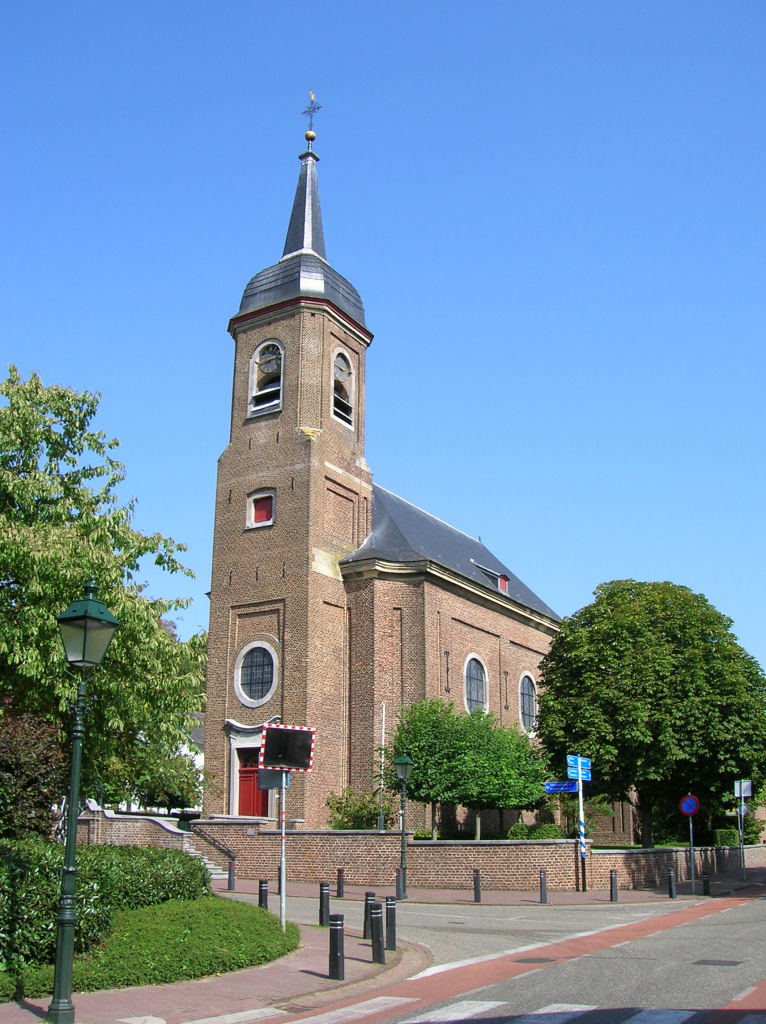 Agathakerk te Eys